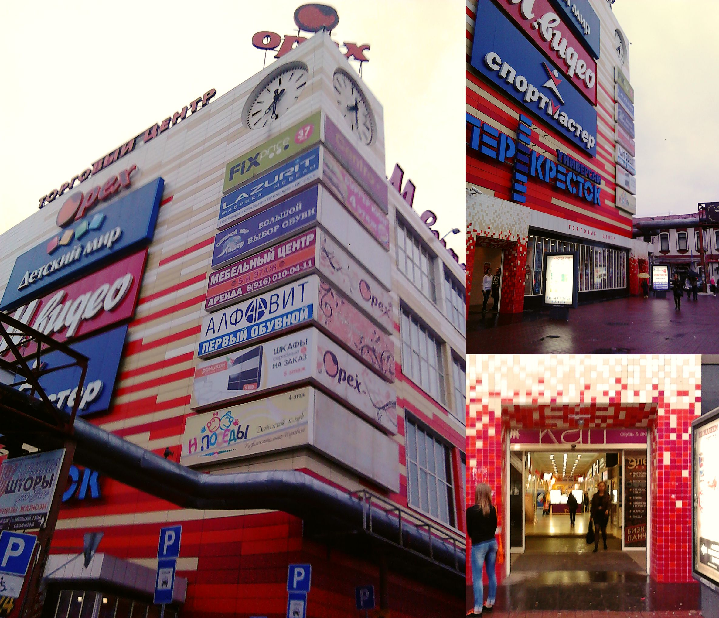 Торговый центр "Орех" г. Орехово-Зуево, авгусь 2013